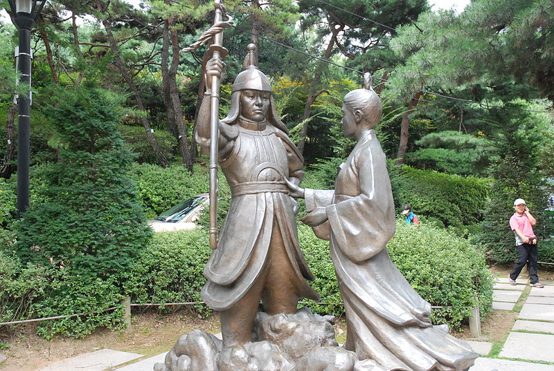 평강공주와 온달장군 조형물